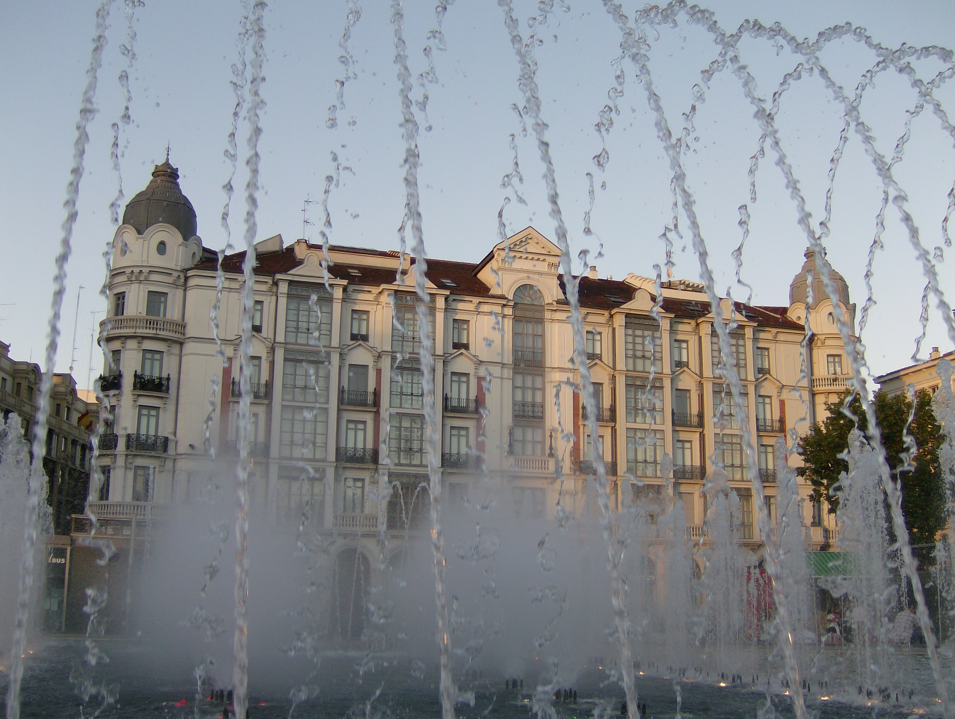 Casa Mantilla (Valladolid)